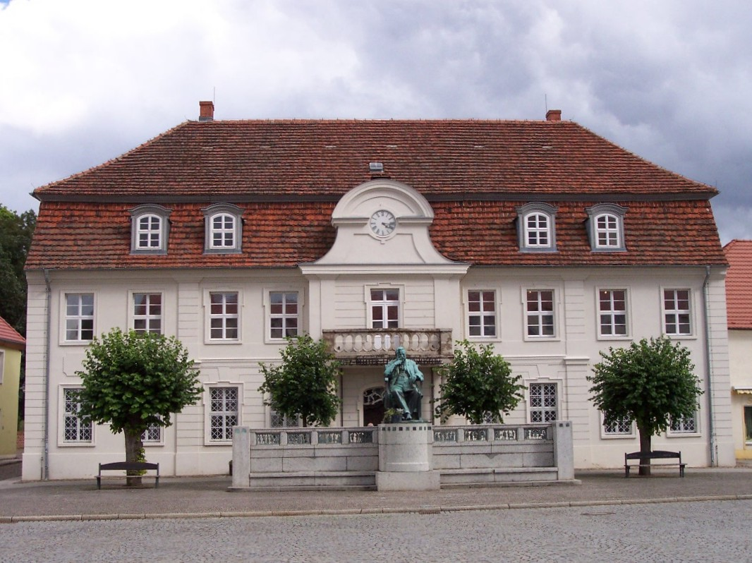 Bildbeschreibung: ehem. Rathaus Stavenhagen mit Reuter-Statue Quelle: selbst fotografiert Datum: 06. August 2005 Fotograf: Heiko Doliff